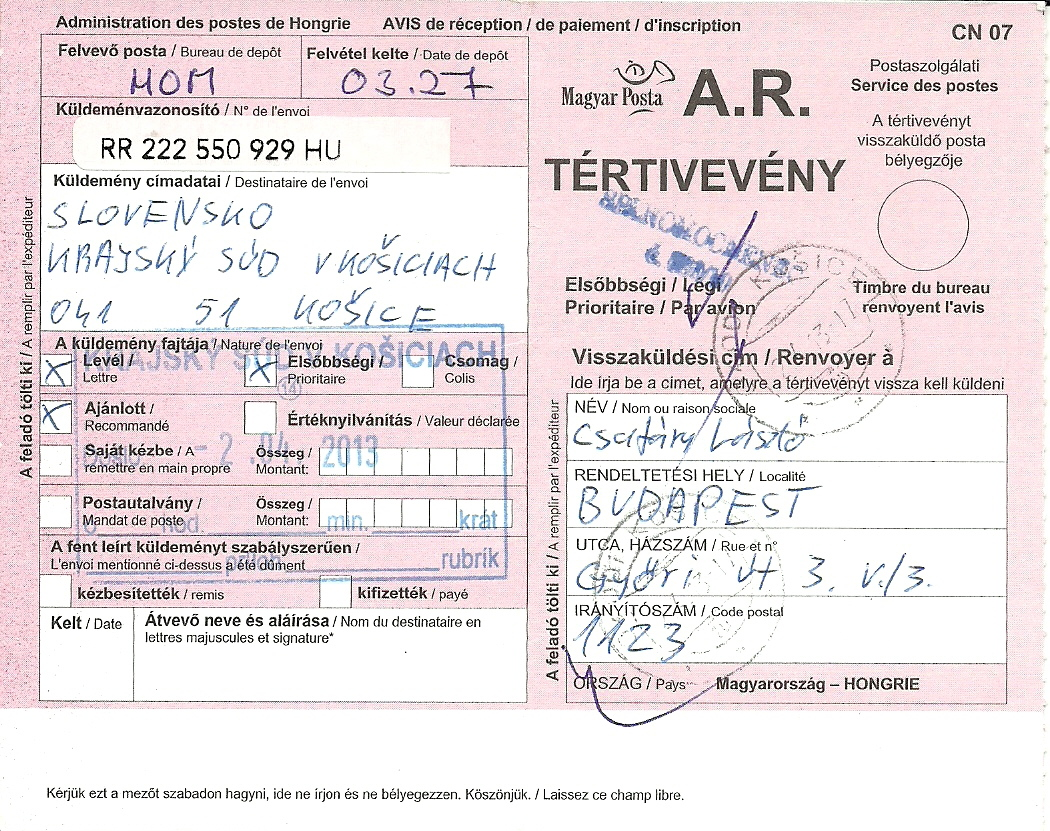 Csatáry László 2013. március 27-én a Kassai Kerületi Bíróság útján a Szlovák Legfelsőbb Bíróságnak az ítélet és az eljárás ellen benyújtott panaszlevelének postai tértivevénye